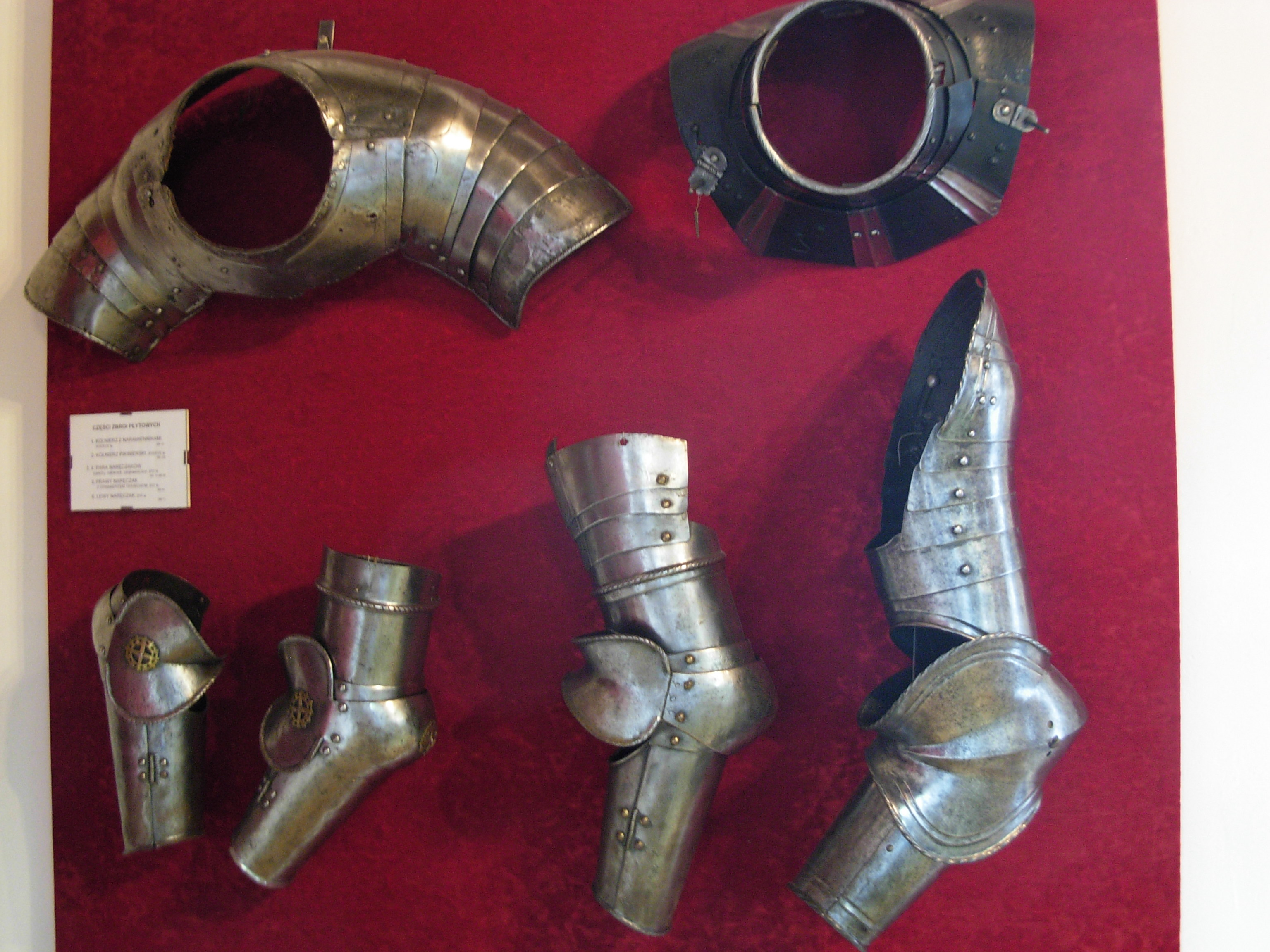 Items from Muzeum Zagłębia, in Castle in Będzin, Poland.